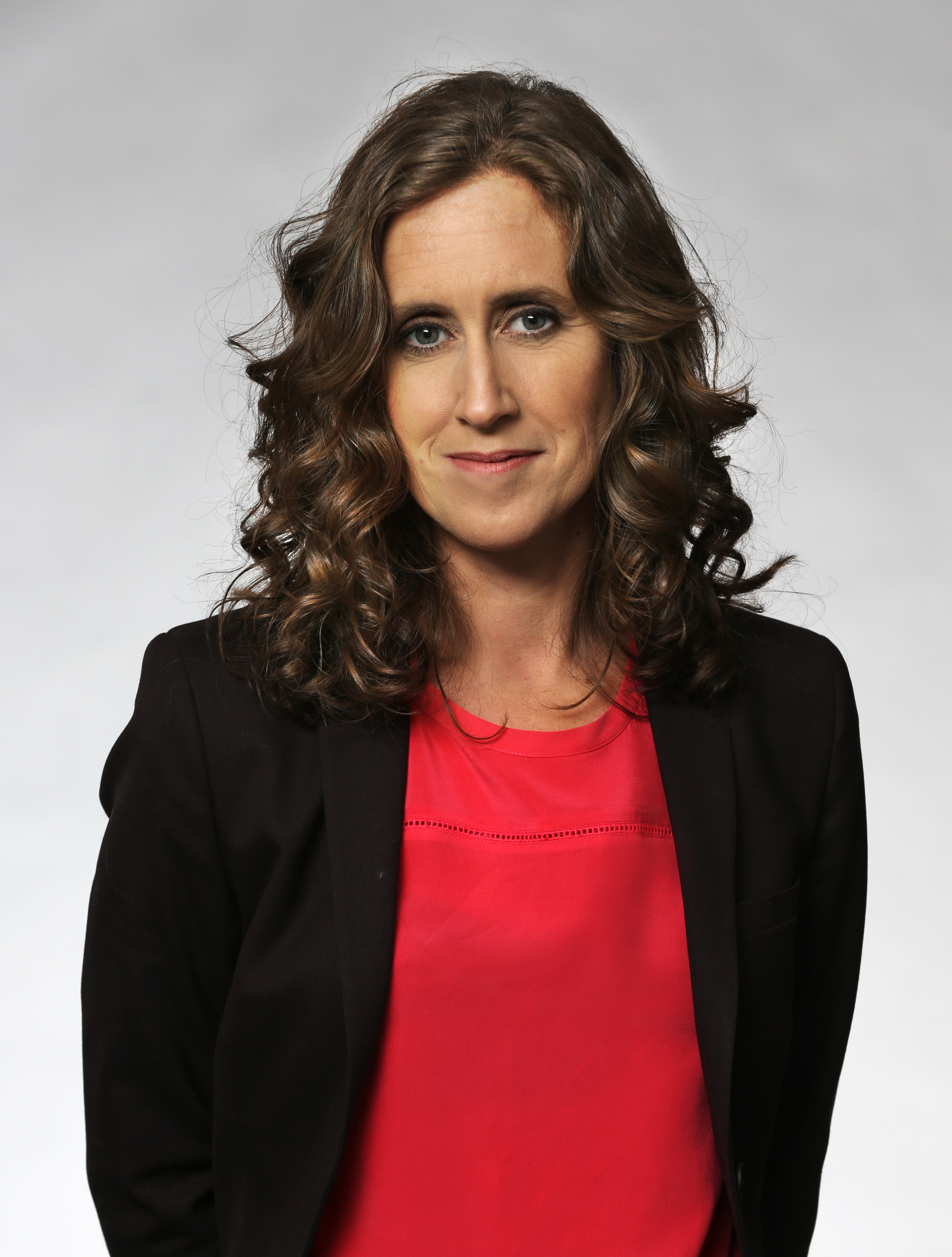 Sveriges Televisions VD Hanna Stjärne.